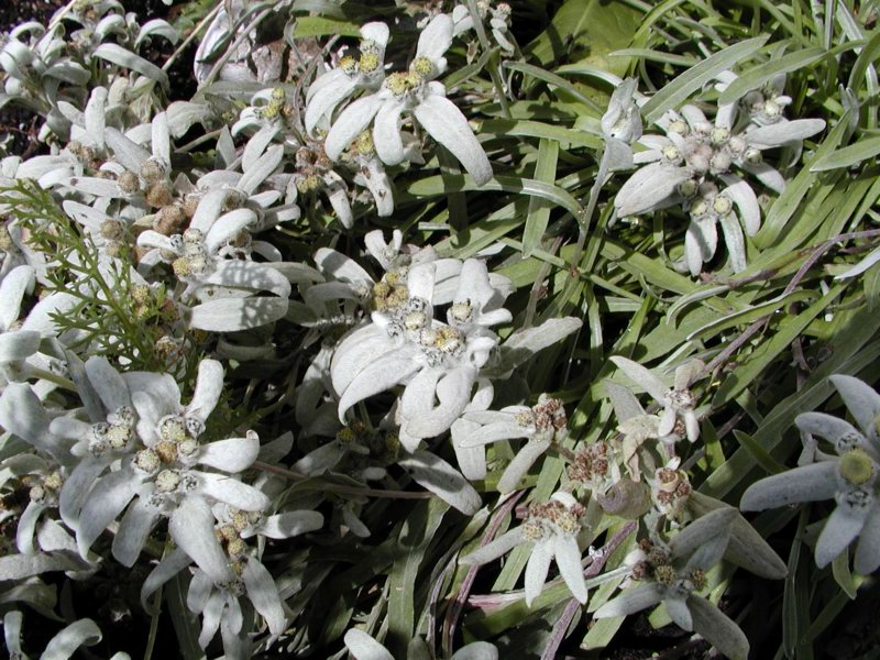 Edelweiß